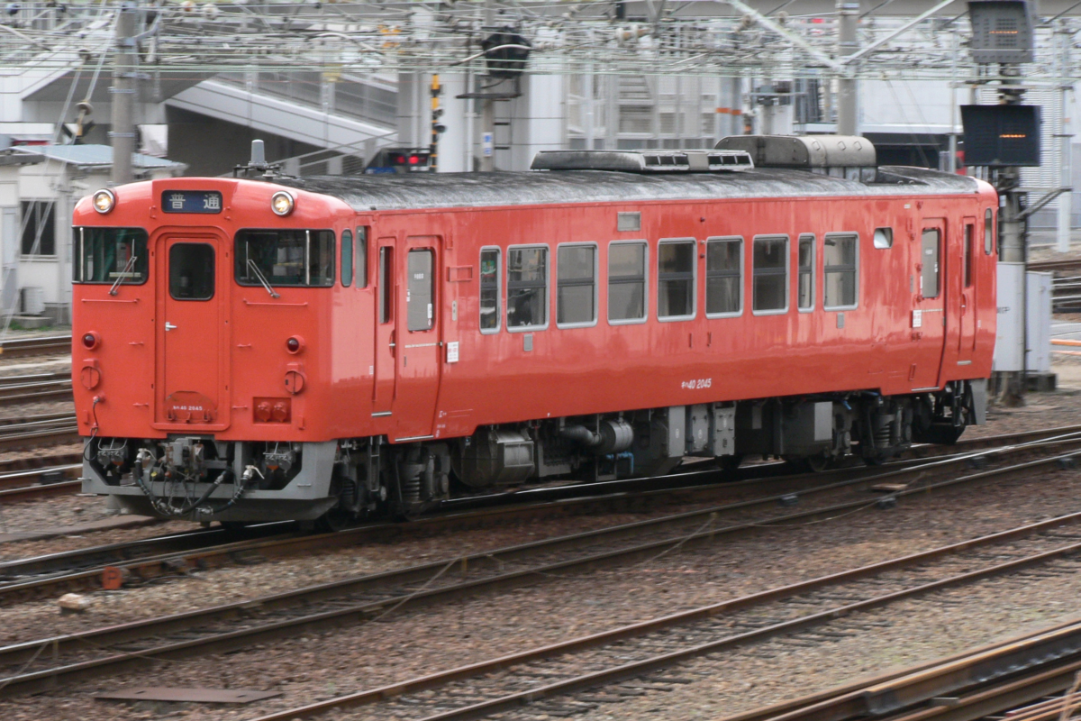 JR西日本、キハ40 2045（首都圏色）